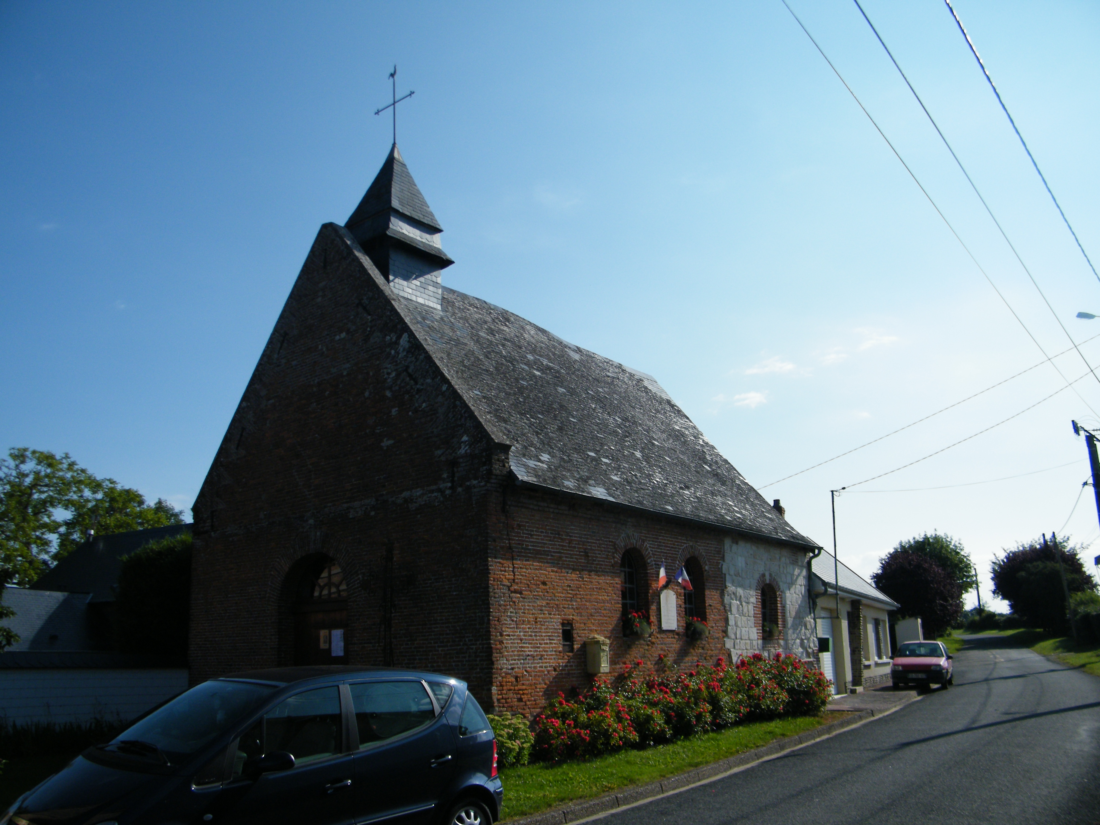 église.